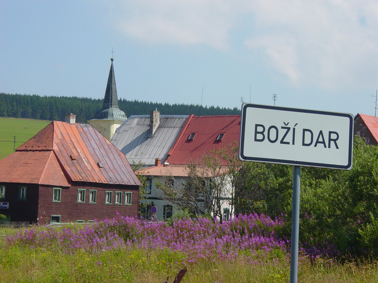 Die Stadt Boží Dar (deutsch: Gottesgab) im tschechischen Erzgebirge photen taken by Mazbln on August 8, 2004